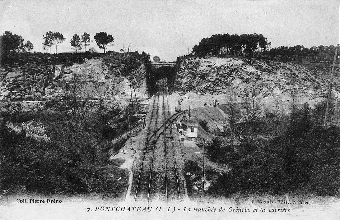 Le site de Grénébo vers 1900, avec au centre la tranchée du chemin de fer et à droite l'embranchement de la carrière.